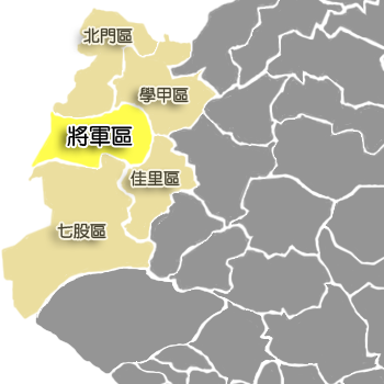 將軍區相對位置